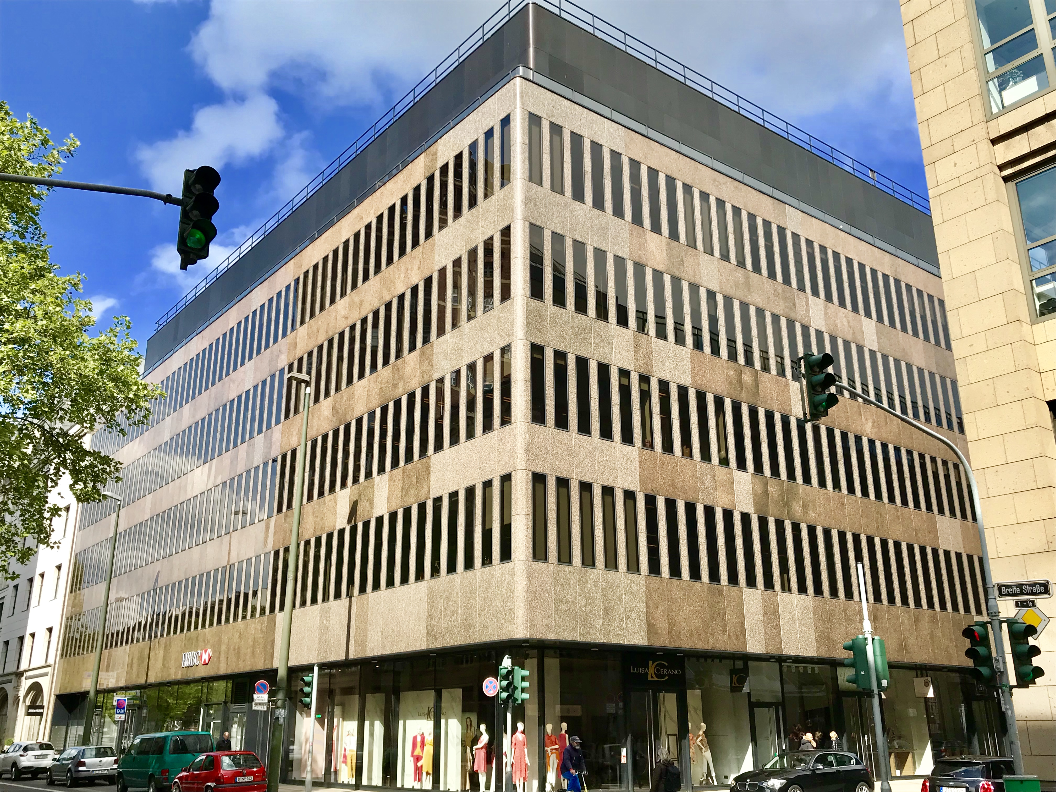 HSBC Deutschland - Zentrale Königsallee